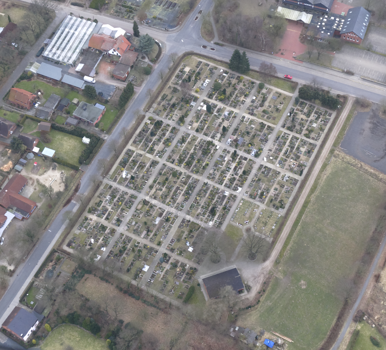 Luftaufnahme: Friedhof Hambergen